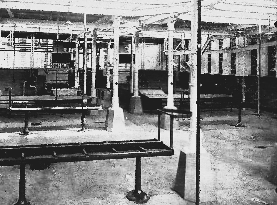 Schweineschlachthalle des Seegrenzschlachthofes in Lübeck.